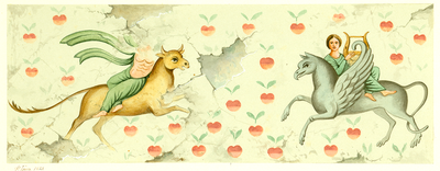 Гросс Ф. И. Роспись на задней стене "склепа 1875" (1-ая половина II в. н.э.) на горе Митридад, над погребальной нишей. Прорисовка из археологического отчёта